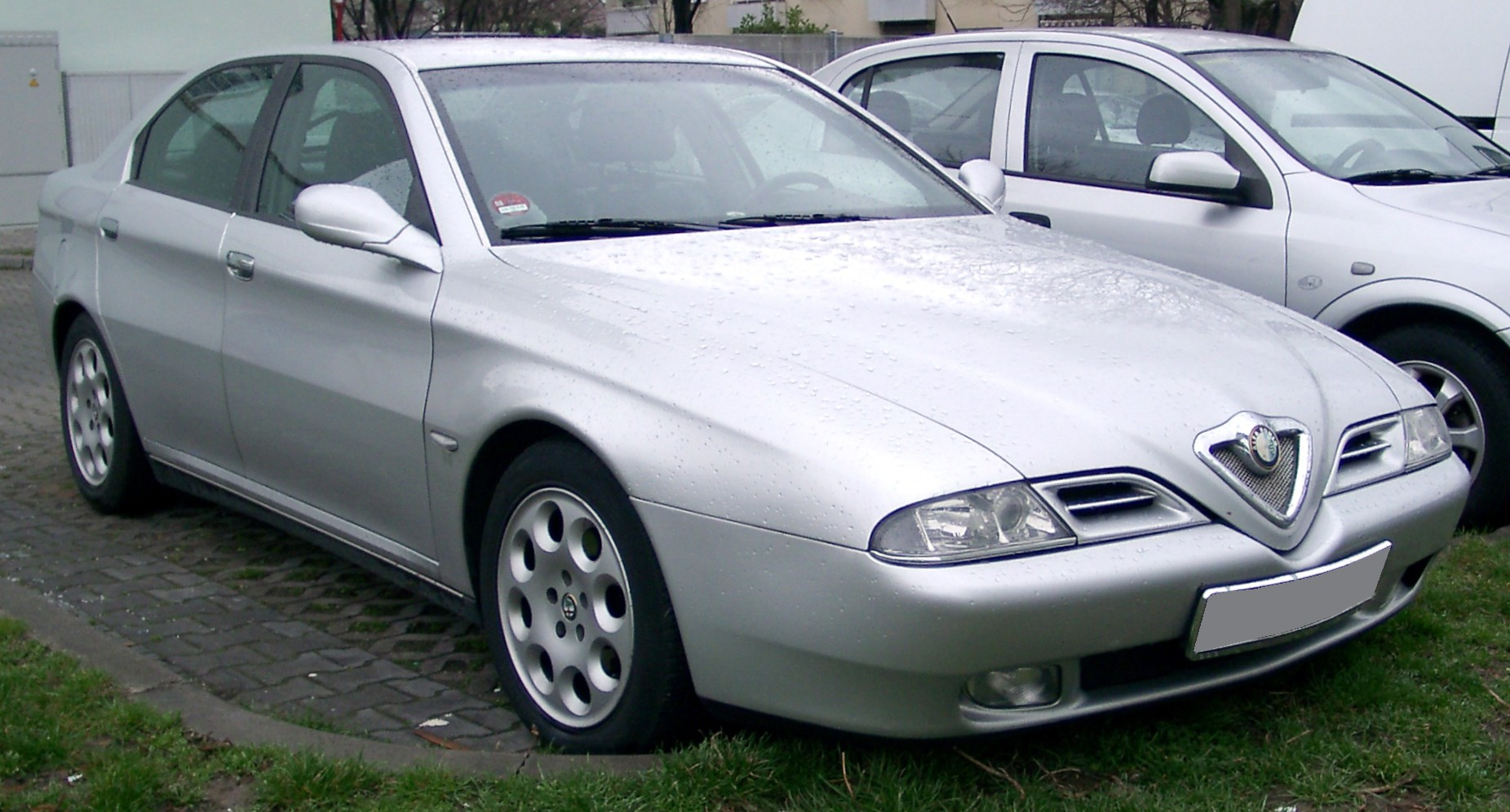 Alfa Romeo 166